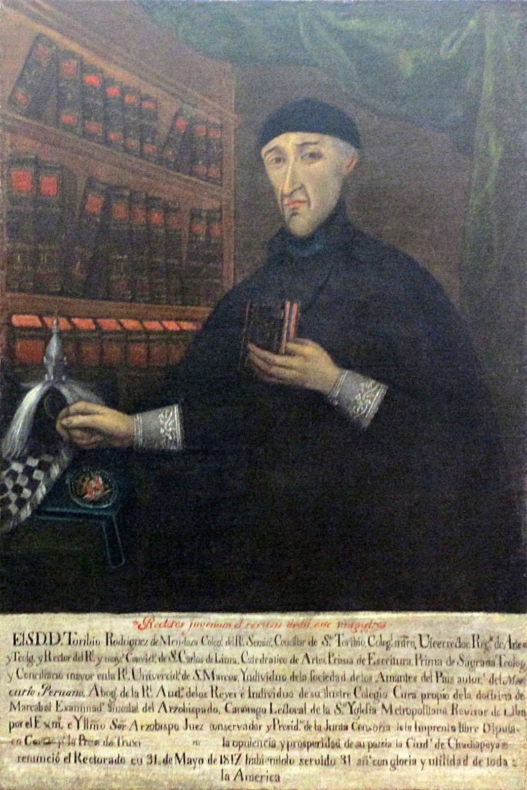 Retrato de Toribio Rodríguez de Mendoza (1750-1825), rector de la Universidad de San Marcos